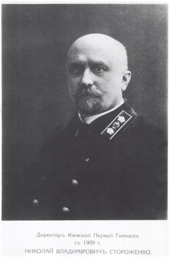 Николай Владимирович Стороженко (1862-1942), историк и педагог